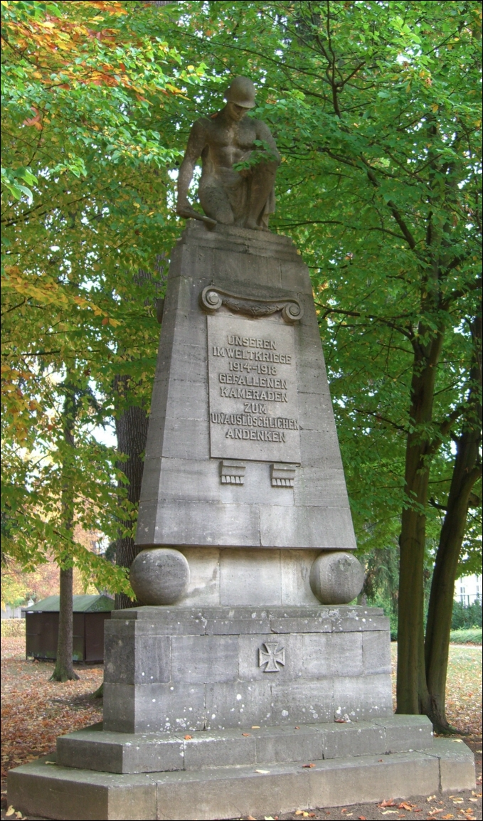 Kriegerdenkmal 1914/18 Neustrelitz